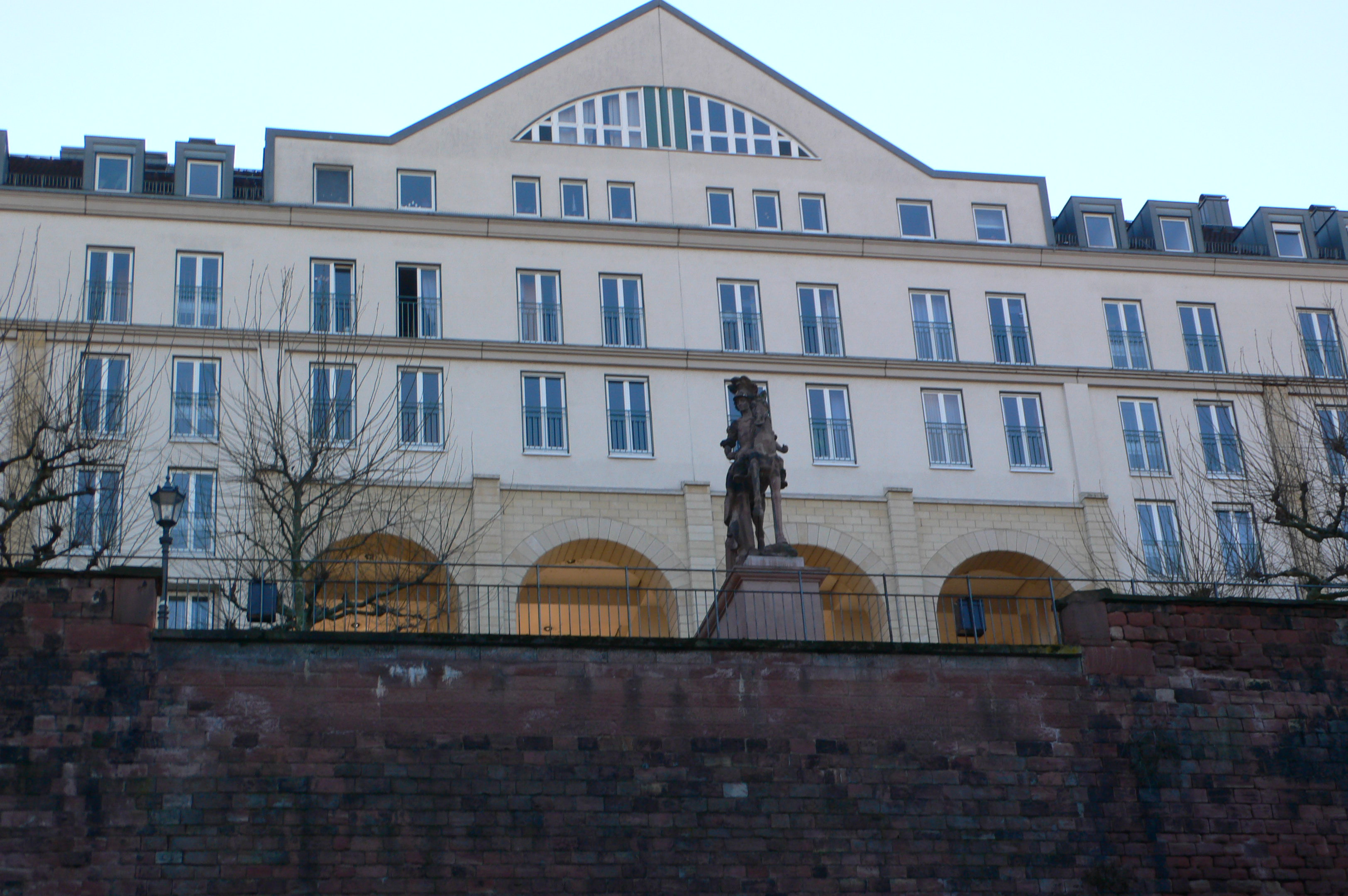 Arkaden der Kästrich-Siedlung